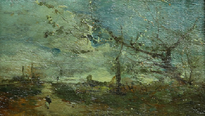 "Strada a Rouan", olio su tavola, 13 x 21 cm.